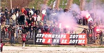 Γήπεδο Χιλιομοδίου